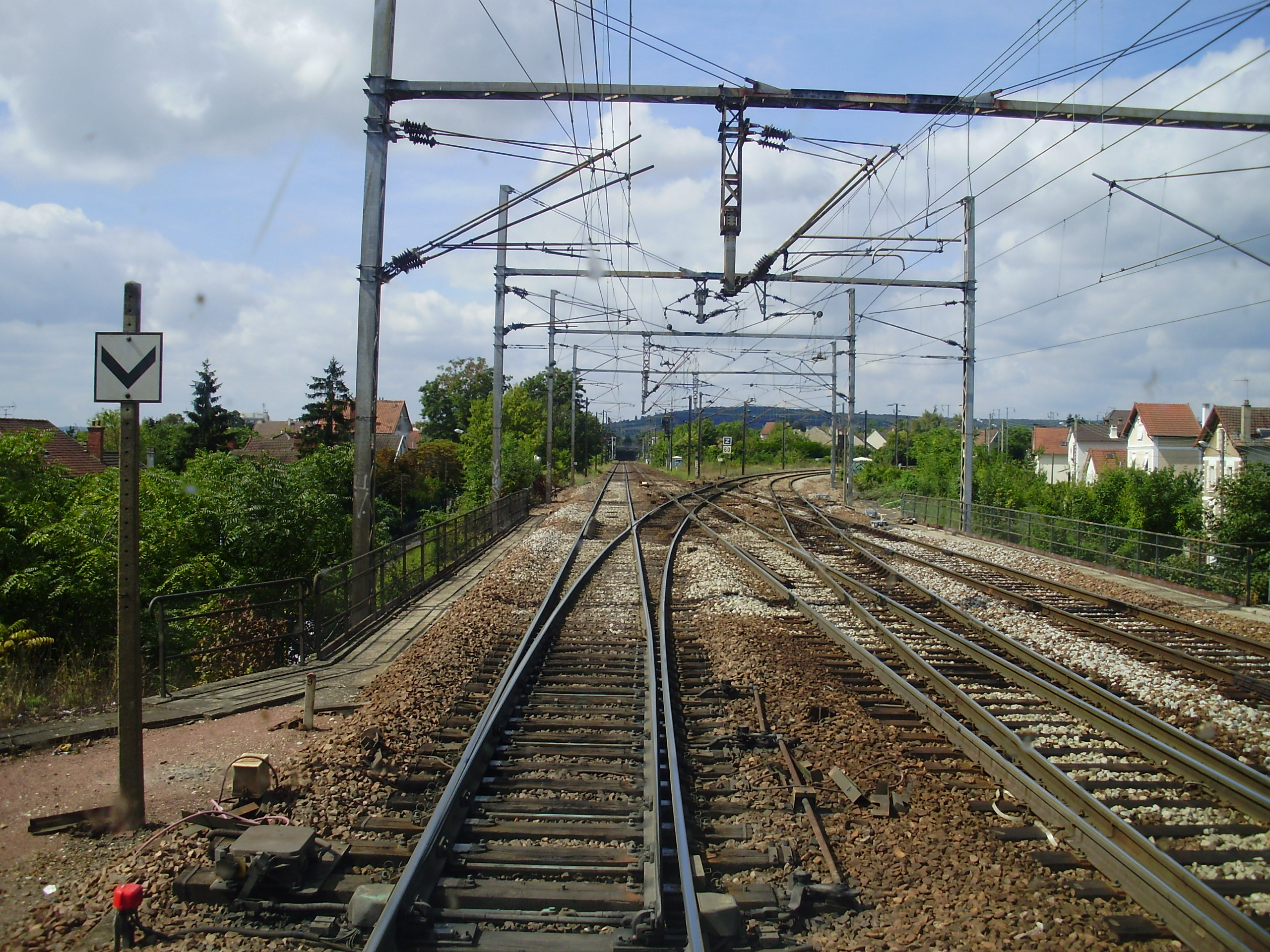 Bifurcation à l'ouest de la gare de Conflans-Sainte-Honorine, Yvelines, France, entre la ligne de Paris-Saint-Lazare à Mantes-Station via Conflans-Sainte-Honorine (groupe VI) et, à droite, une jonction permettant de rejoindre la ligne d'Achères à Pontoise, vue depuis la cabine de conduite d'une rame se dirigeant vers Pontoise